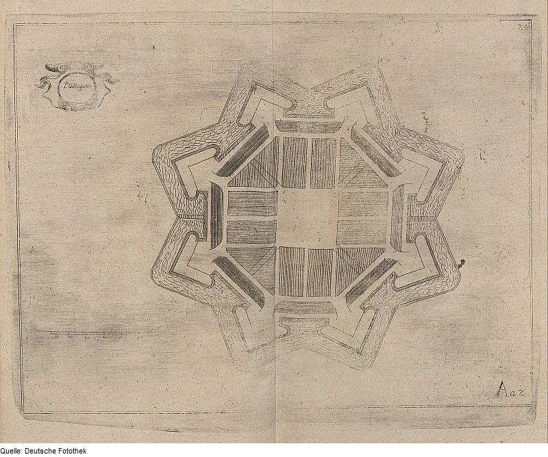 Original image description from the Deutsche Fotothek Architektur & Festungsbau & Bastion & oktogonal